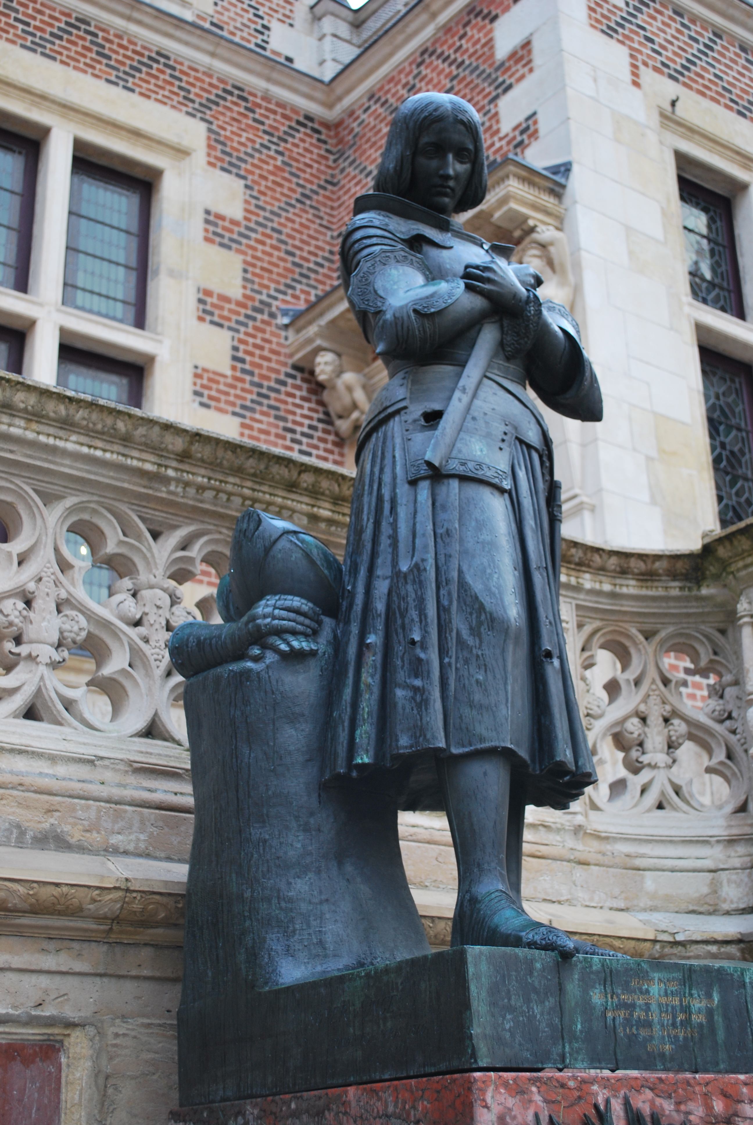 Statue de Jeanne d'Arc située dans la cours de l'Hôtel Groslot d'Orléans, en France.